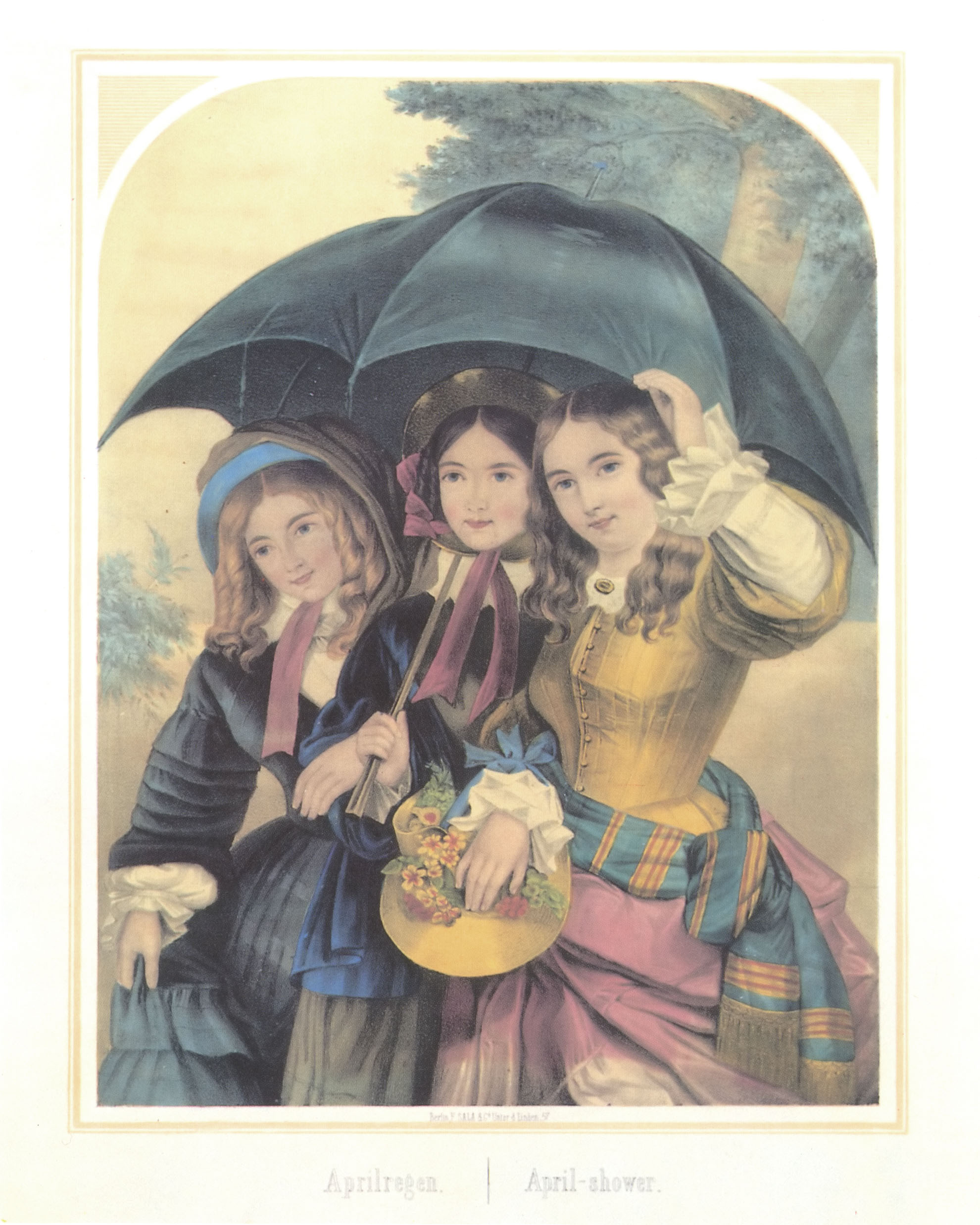 Aprilregen/April-shower. Kolorierte Lithografie mit Tonplatte. Verlag F. Sala & Co.